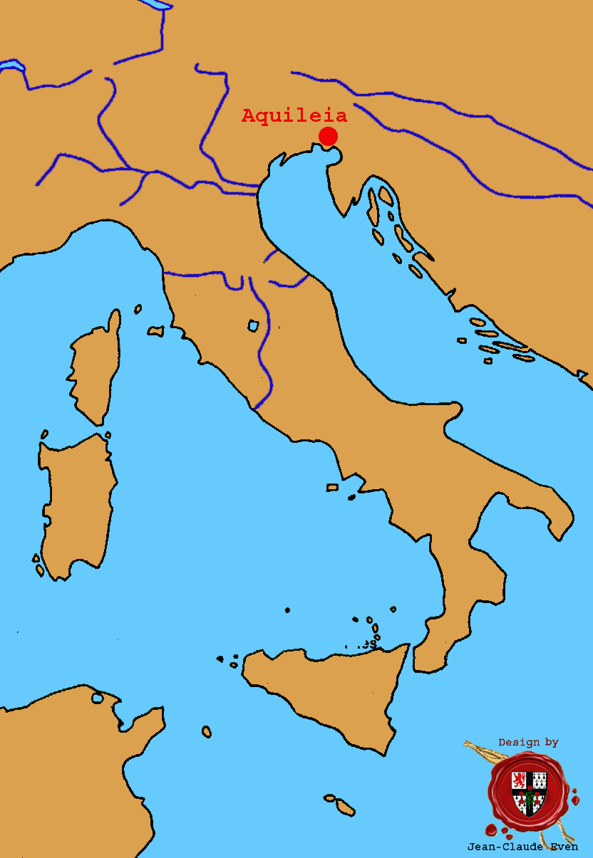 Aquileia